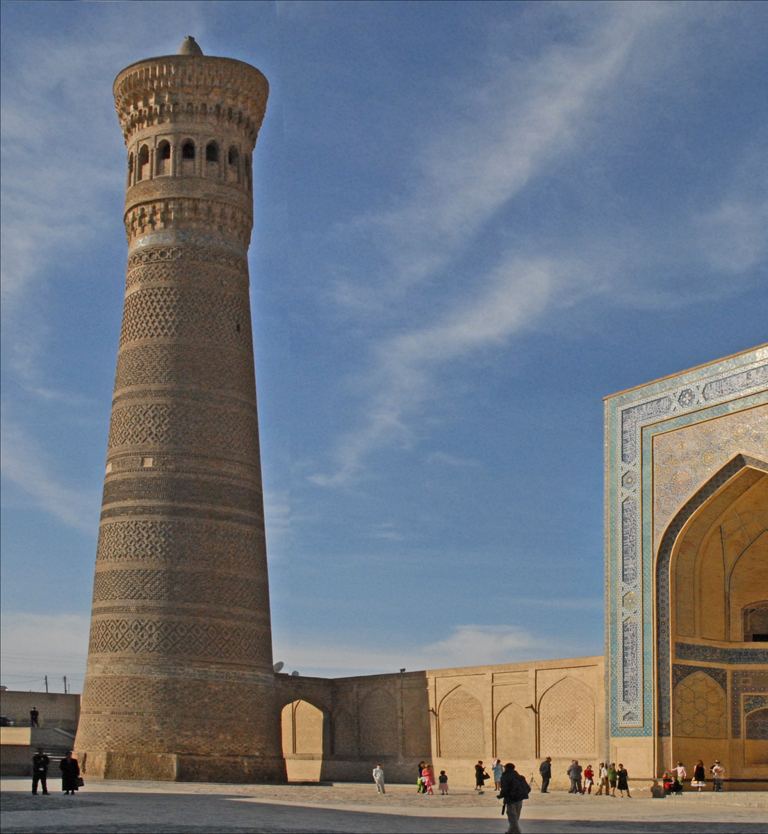 La mosquée Kalon ou "grande mosquée" (à droite) est la "mosquée du vendredi" de Boukhara. C'est l'une des mosquées les plus anciennes mais aussi les plus vastes de l'Asie centrale. Elle pouvait accueillir 10.000 fidèles. La première construction sur ce site date de 795 par les conquérants arabes. Le bâtiment actuel a été achevé en 1514, par la suite il a été embelli puis restauré au cours de l'époque soviétique. Le minaret Kalon (à gauche) a été construit en 1127 par le Karakhanide Arslan Khan. Haut de 48m, il servait à appeler à la prière mais également, au 17ème siècle, à jeter dans le vide les condamnés à mort. Une autre fonction était de servir de phare pour les caravanes arrivant du désert car un feu était allumé à son sommet chaque nuit. De forme conique, il est décoré de motifs géométriques réalisés en briques. Le minaret a été restauré dans les années 1930 puis dans les années 1970 à la suite d'un tremblement de terre. Le minaret est le symbole de Boukhara, "Perle de l'Islam, oasis au coeur du désert Kyzyl Kum et ville sainte, une cité mystérieuse interdite aux infidèles durant plusieurs siècles.